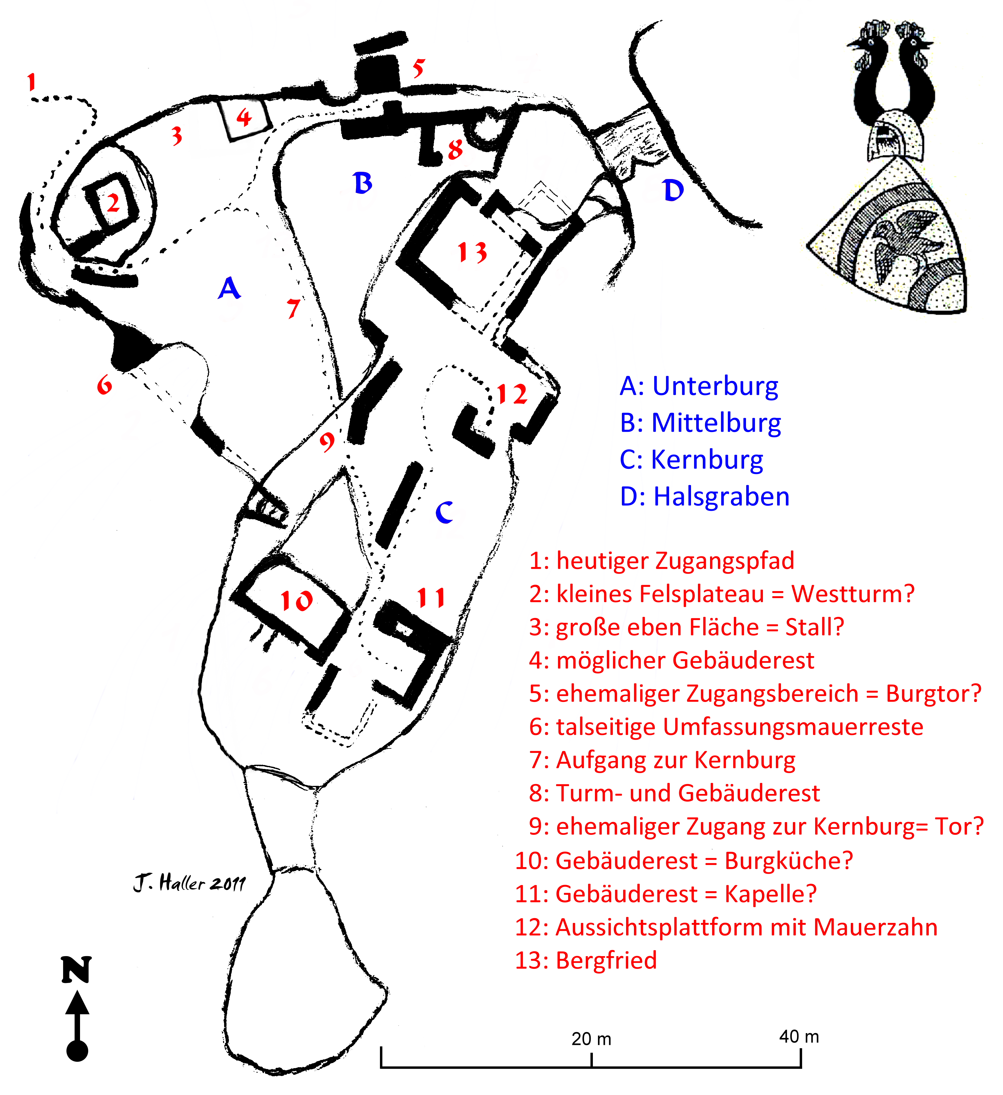 Grundrissskizze mit geringer maßstäblicher Genauigkeit. Erfasst jedoch alle westlichen Gesichtspunkte und gibt eine brauchbare Orientierung über Ausdehnung und noch erkennbare Baureste der Burgstelle.